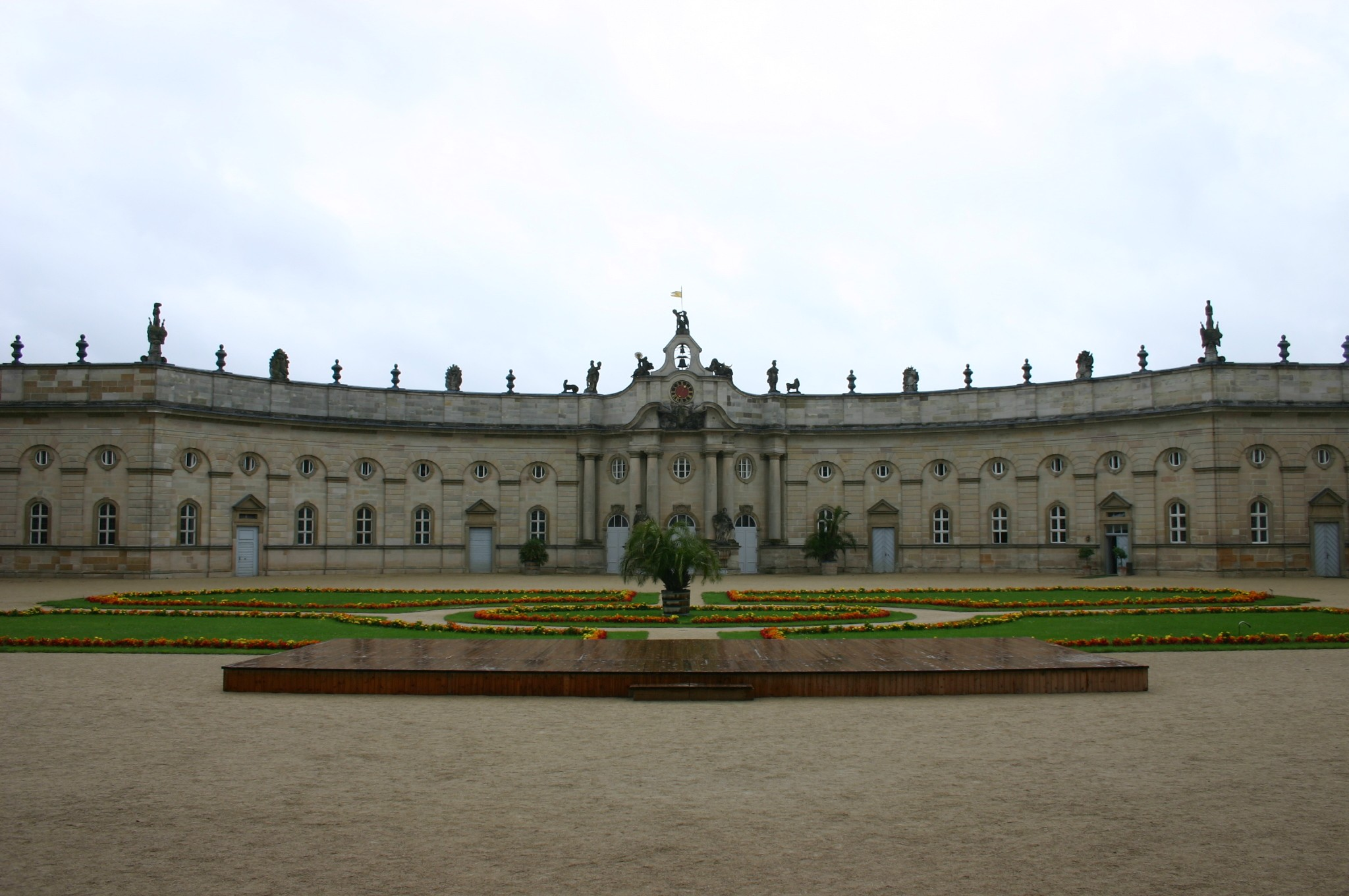 Marstall Schloss Weissenstein, Schaufassade